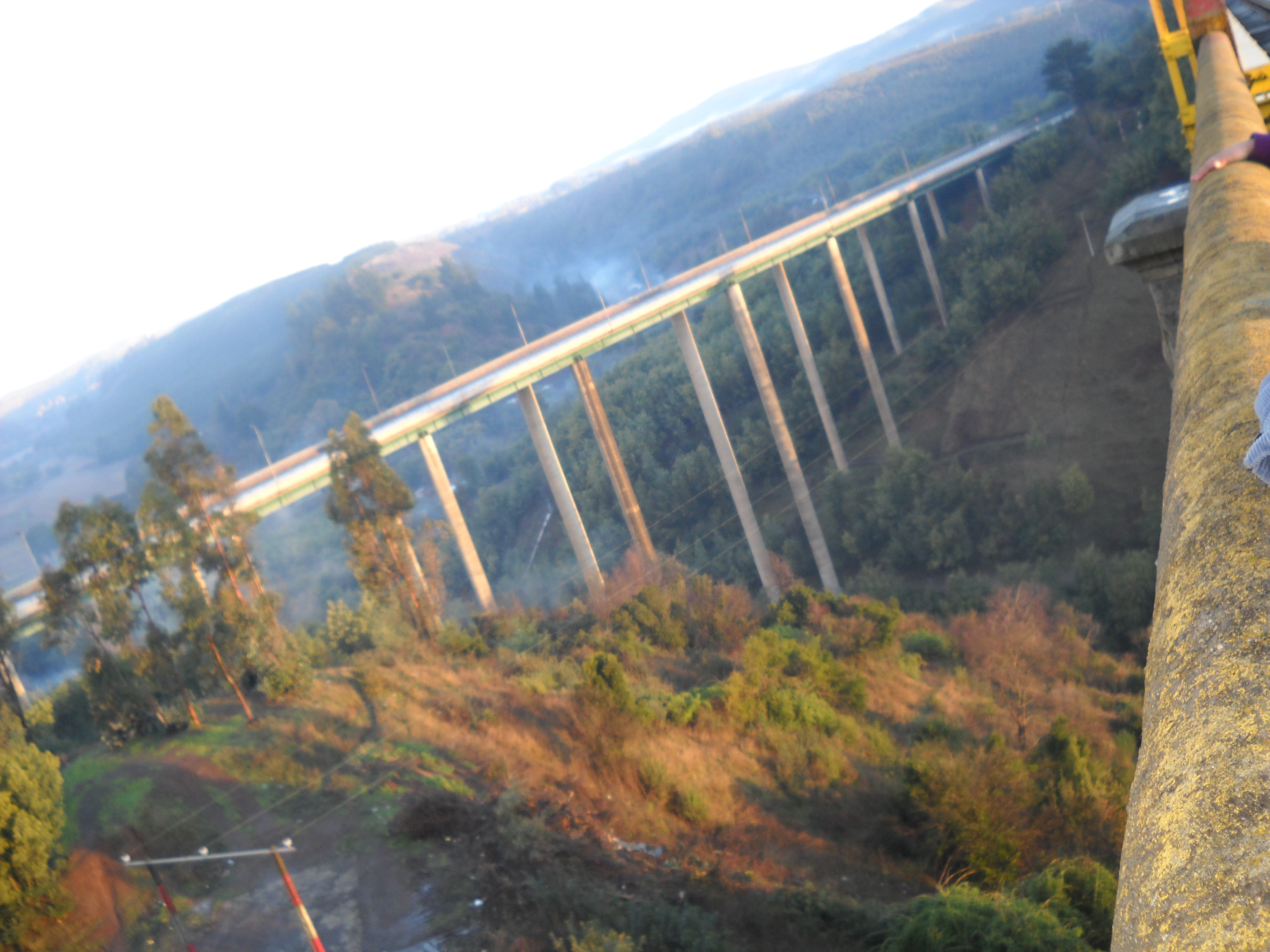 Vista del puente de la ruta 5, sobre el rio malleco en Collipulli.